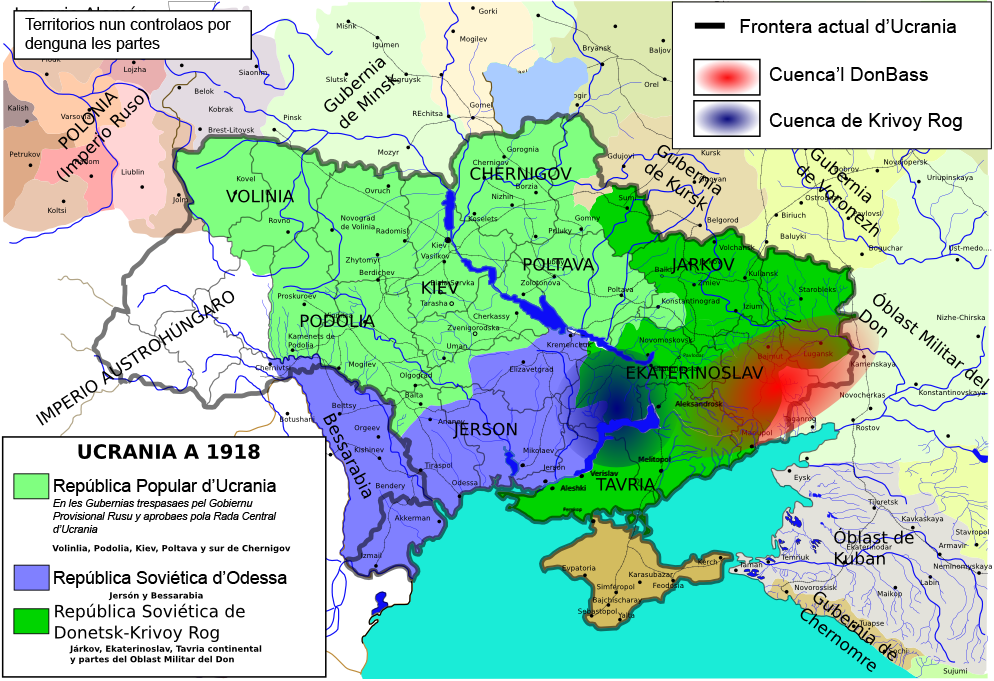 Cuencas del Donbass y Krivoy Rog, sobre mapa anterior a 1917